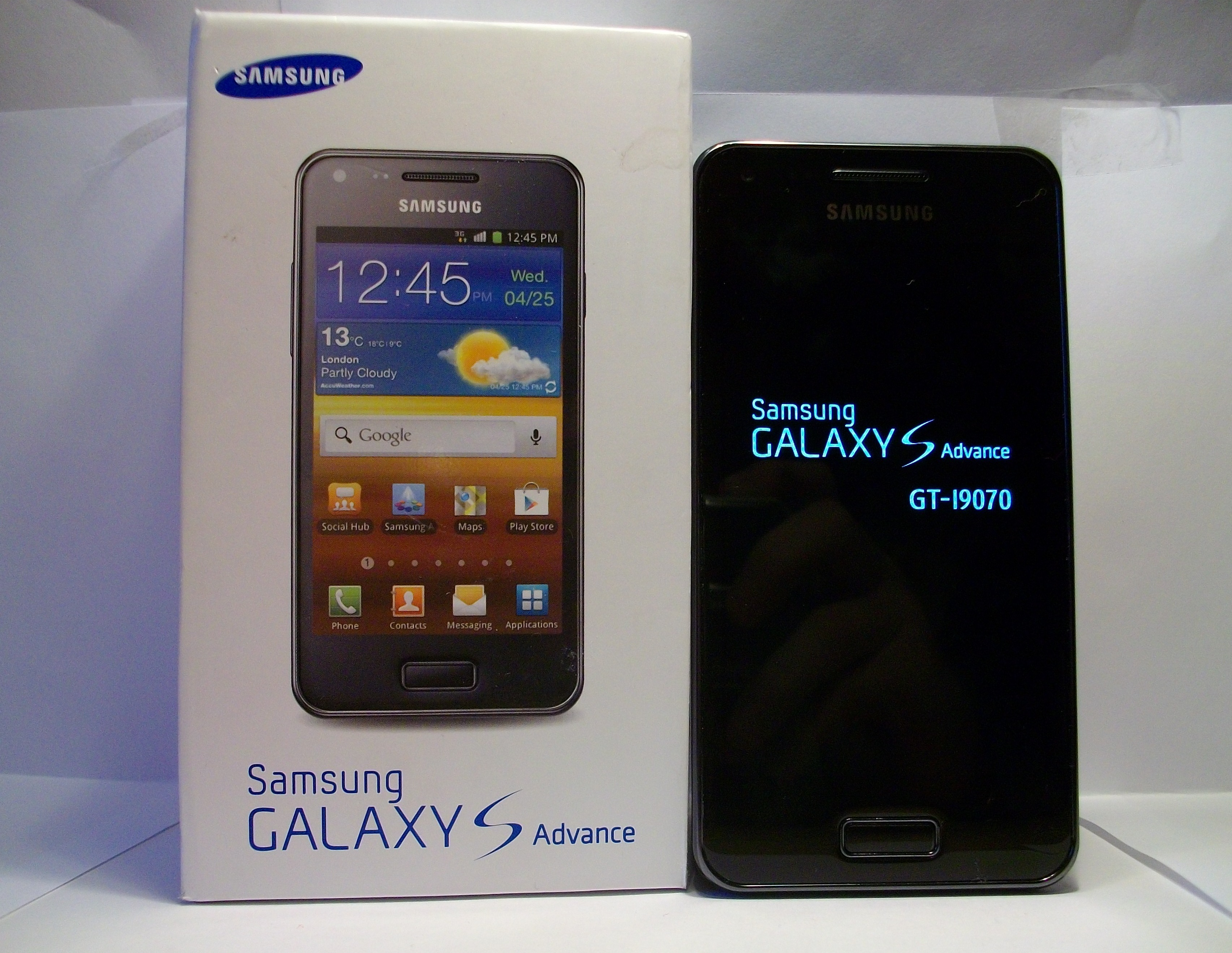 Das Samsung Galaxy S Advance, GT-I9070, während dem Startvorgang und die zugehörige Verpackung